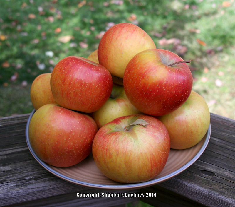 Rubinette